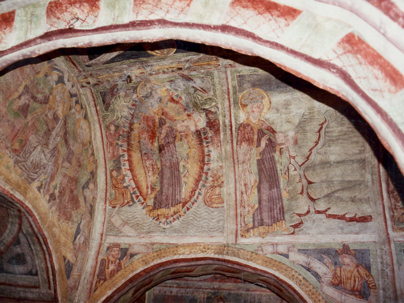 Hrastovlje